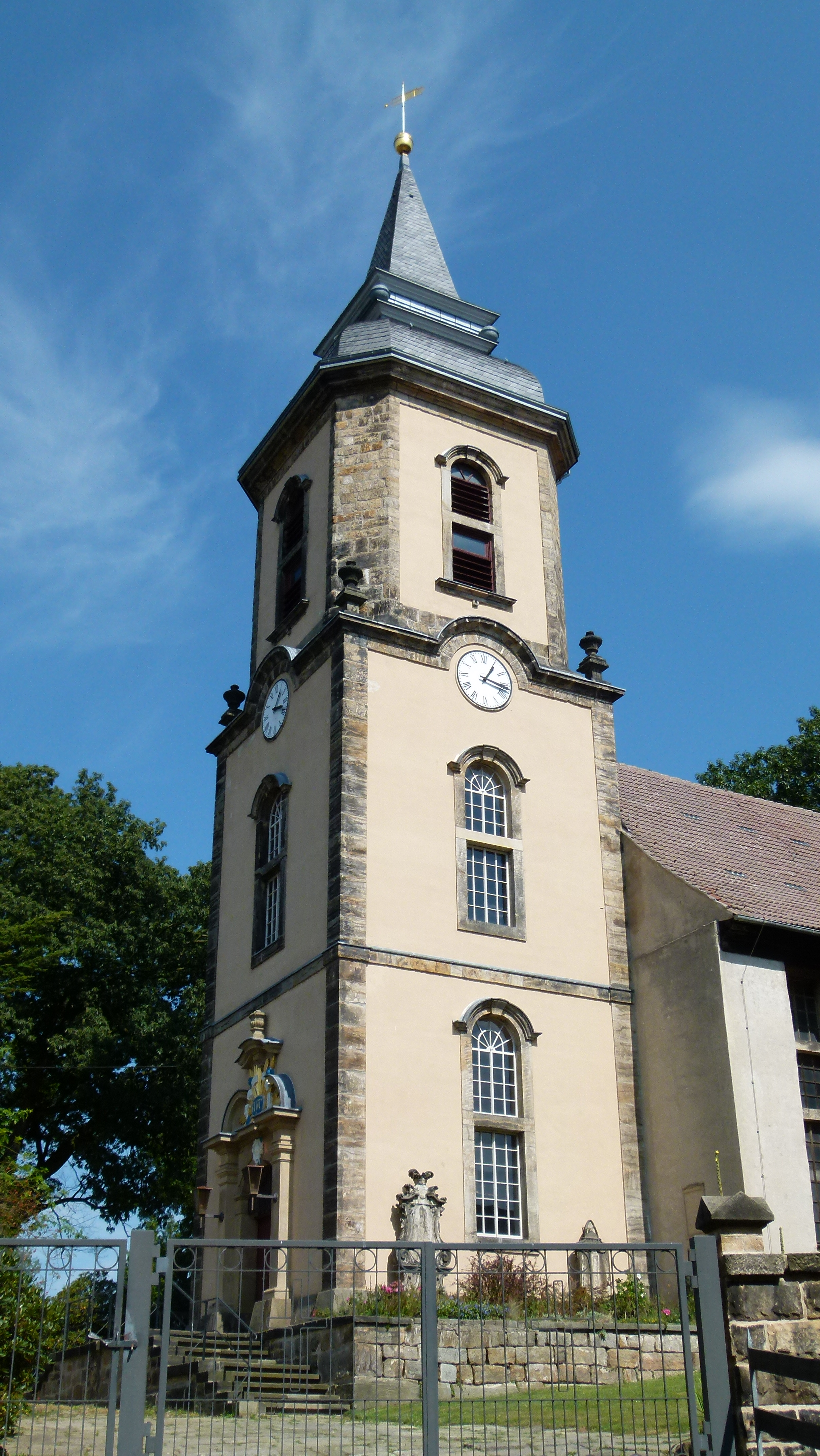 Kirche Dorf Wehlen, Sachsen